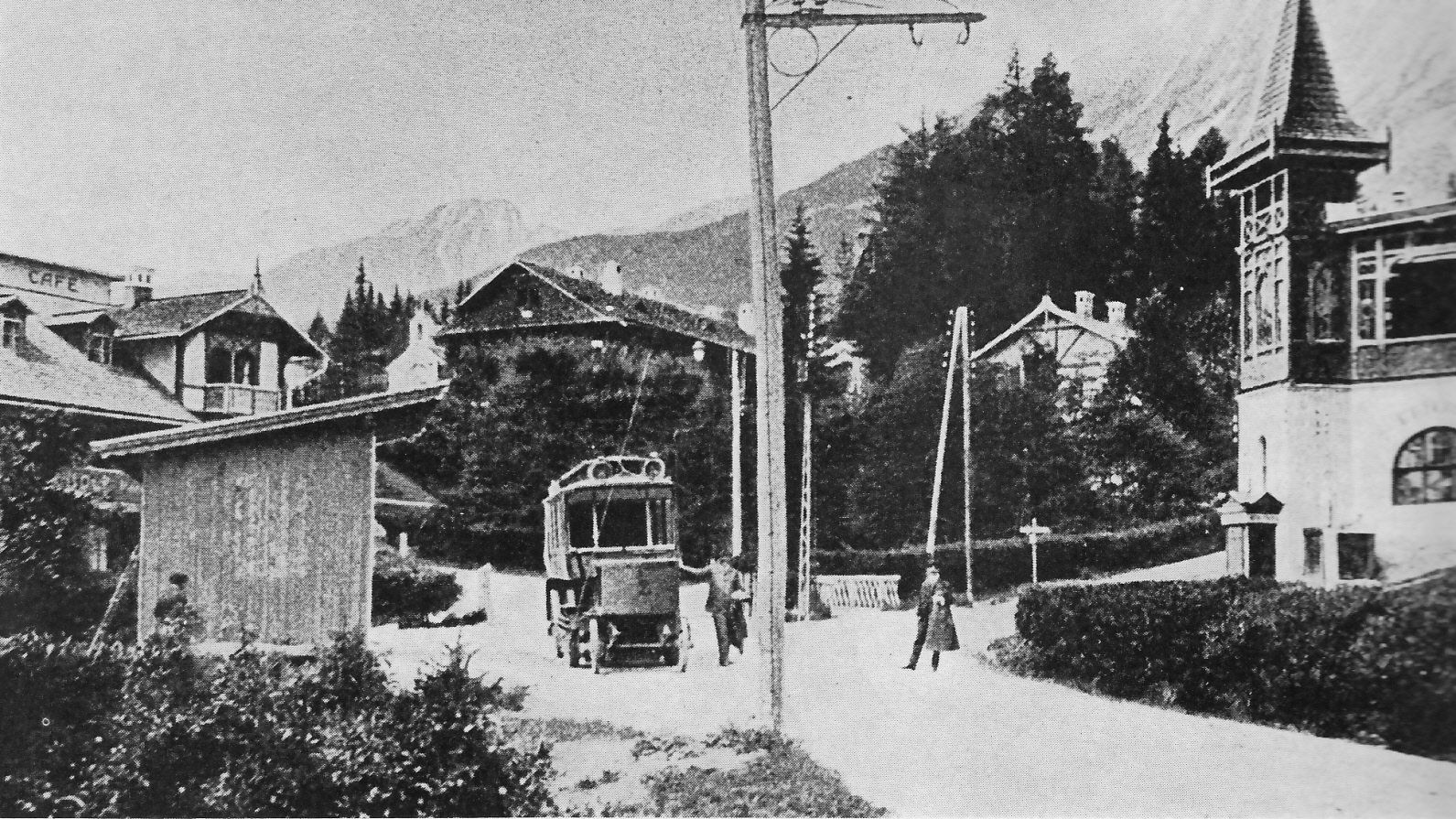 Cestný elektrobus - pokusné jazdy z Popradu do Starého Smokovca v roku 1904